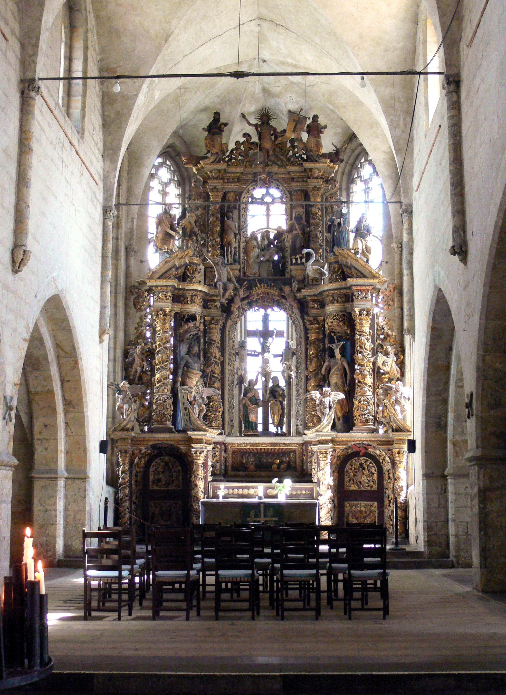 Altar von St. Martini in Halberstadt